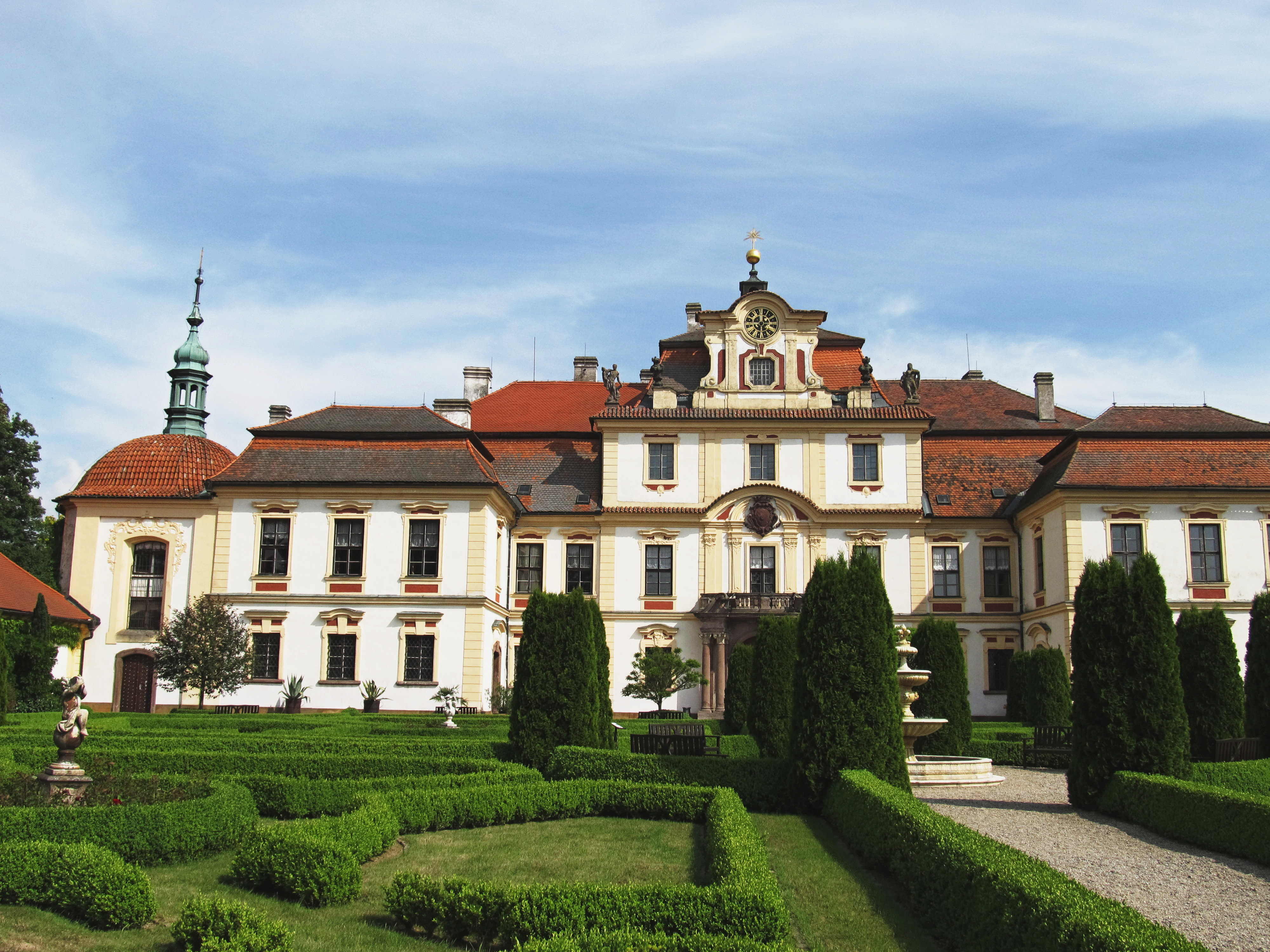 Vstupní průčelí zámku